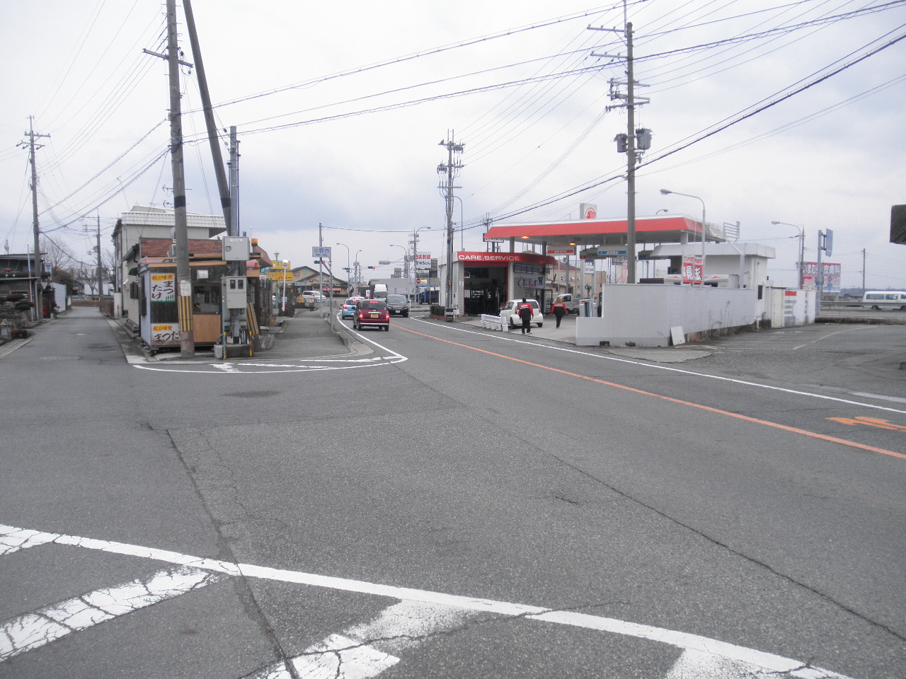 兵庫県加東市東古瀬 兵庫県道567号東古瀬穂積線